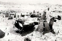 Sector II de la Necrópolis de Las Cogotas, en Ávila (España), en 1930. Tomada por la hija de Juan Cabré.